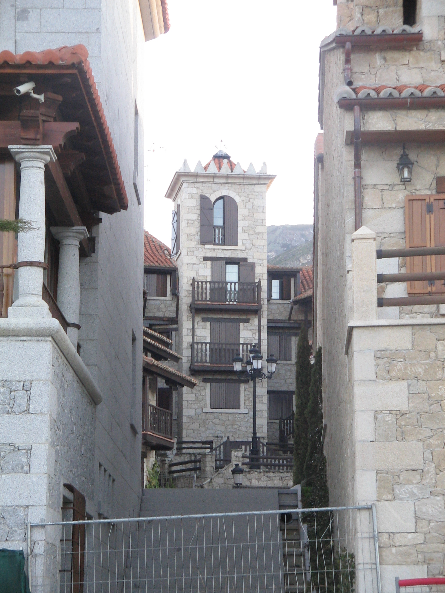 Vista de una casa de reciente construcción en Bohoyo (Ávila).